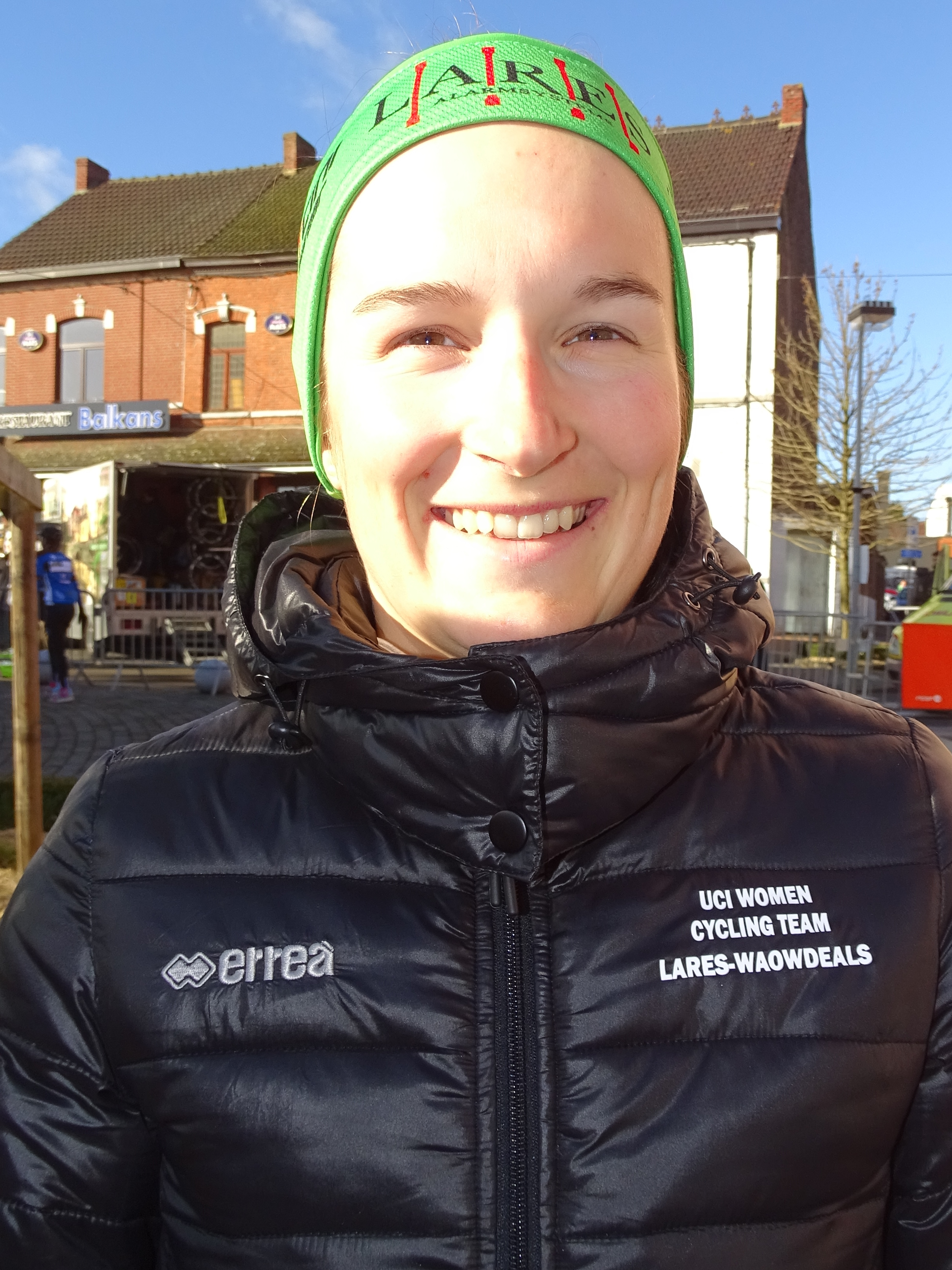 Reportage réalisé le mercredi 2 mars à l'occasion du départ du Samyn des Dames 2016 et du Samyn 2016 à Quaregnon, Belgique.